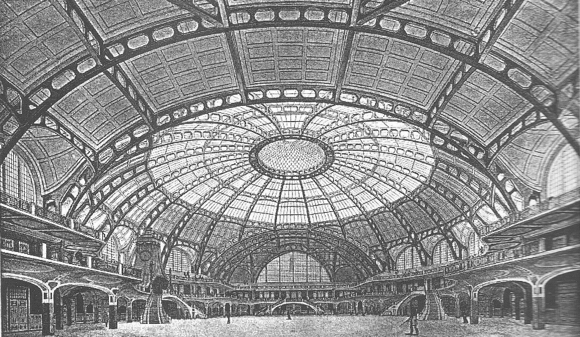 Festhalle Frankfurt kurz nach der Fertigstellung 1909